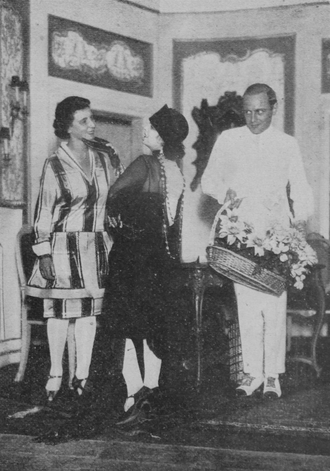 V.l.n.r: Hertha Pauli (1906–1973), Poldi Müller (?–?) und Henri Peters-Arnolds (1897–1988)Neues Wiener Journal, 13. August 1927, S. 12:In den Wiener Kammerspielen findet am Dienstag [16. August 1927] die deutsche Uraufführung von „Mein Sohn - mein Vater!“ (Mademoiselle Flüte), Lustspiel von Louis Verneuil, deutsche Bearbeitung Robert Blum statt, mit den Damen Poldi Müller, Hertha Pauli (von den Berliner Reinhardt-Bühnen), Käthe Franck-Witt, Therese Bellau, Käthe Manig. Martha Zifferer, Martha Auffärber und den Herren Hans Lackner, Peter Lorre, Peters-Arnolds, Willy Hendrchs, Oskar Hugelmann. Ferry Moitelle, Fritz Reiner, Leo Günsberger, Leo Erhardt, Heinrich Gaßner. Die Rolle des „Regisseur“ im Zwischenspiel wird von Robert Blum, der [das] Stück inszeniert, dargestellt werden.